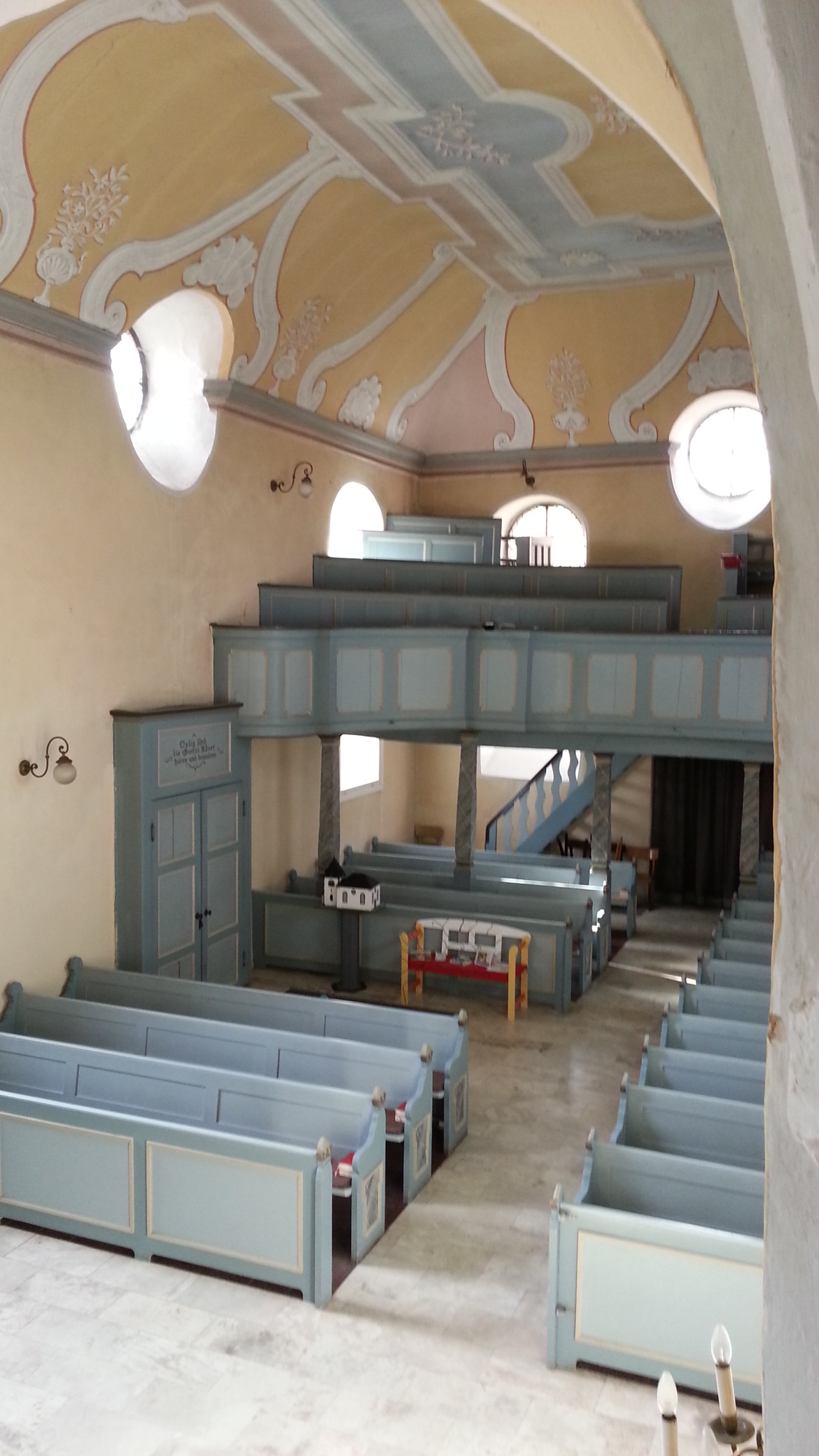 Evangelische Kirche Bettenhausen, Hessen